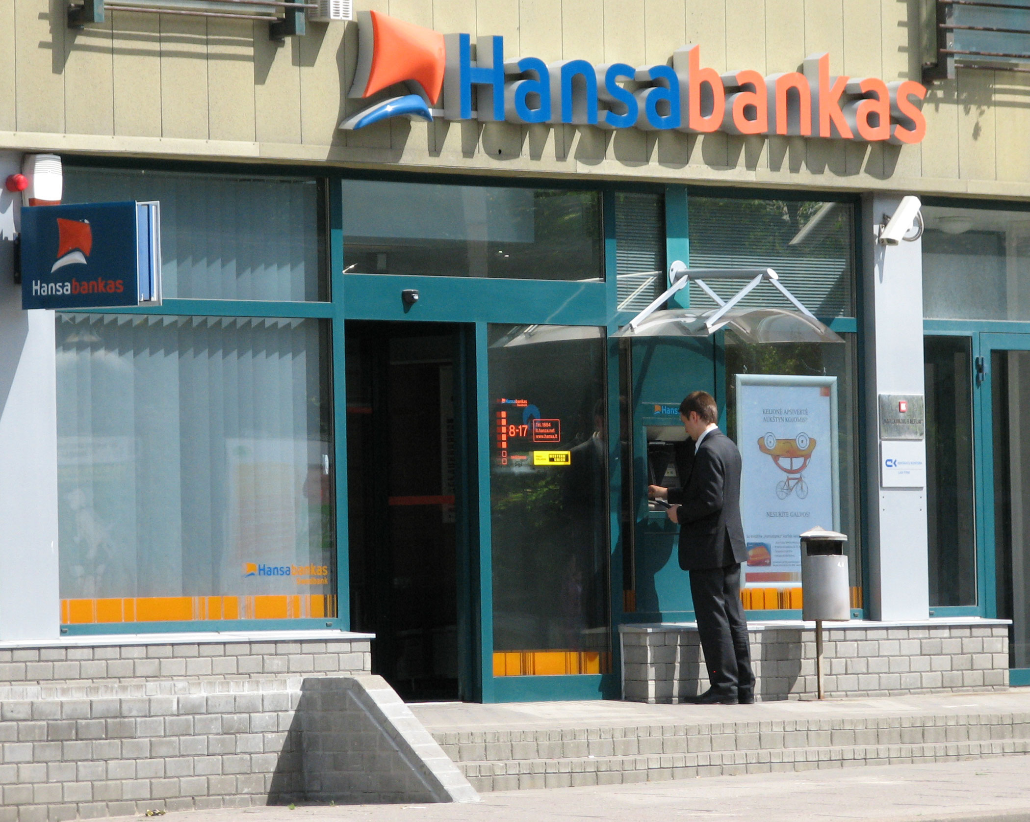 A Hansabankas office on Liubarto gatvė 7 in Vilnius, Lithuania